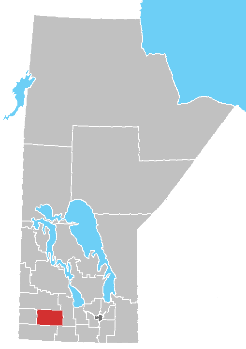 Manitoba census area No. 7